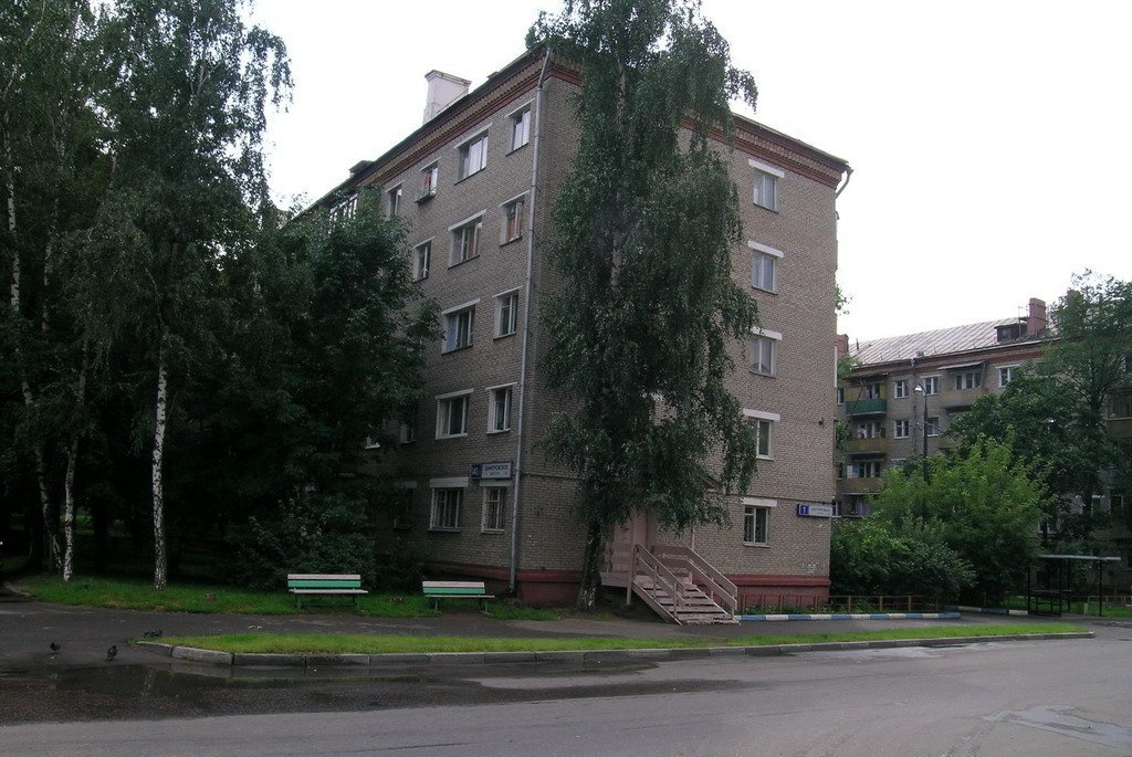 Долгопрудная улица в Москве.